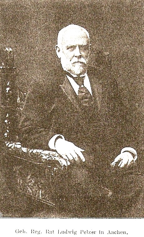 Scan einer in Maccos Buch abgedruckten Ablichtung eines Portraits aus dem Familienbesitz